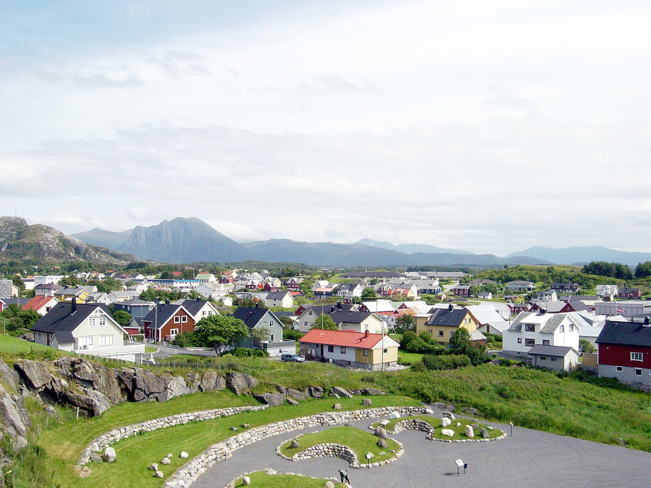 Bud in Norway (Møre og Romsdal)